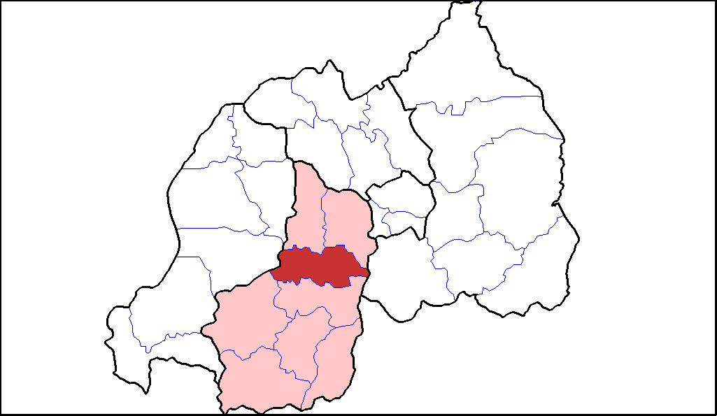 Distretto di Ruhango.